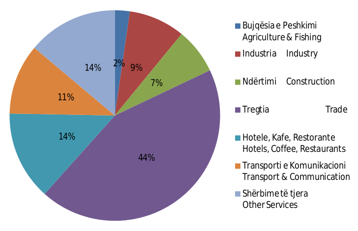 Zhvillimi ekonomik i Kukësit 2010